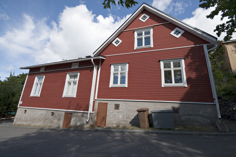 Childhood home for Lauri Viita. Now Lauri Viita museum.